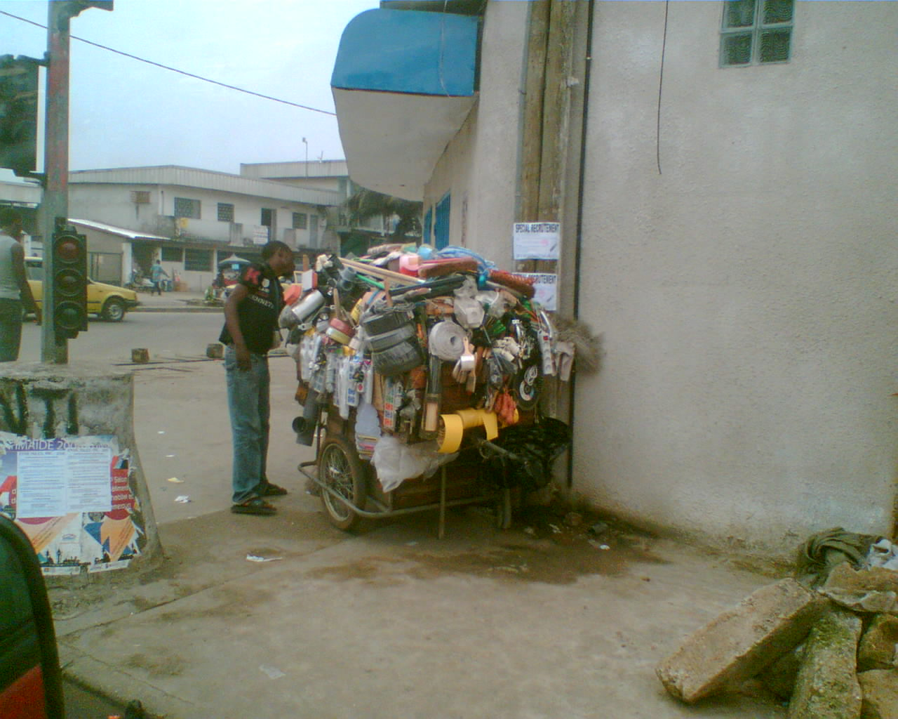 Cameroun - Douala - Quincaillerie ambulante This is an image with the theme "Africa on the Move or Transport" from: Cameroon